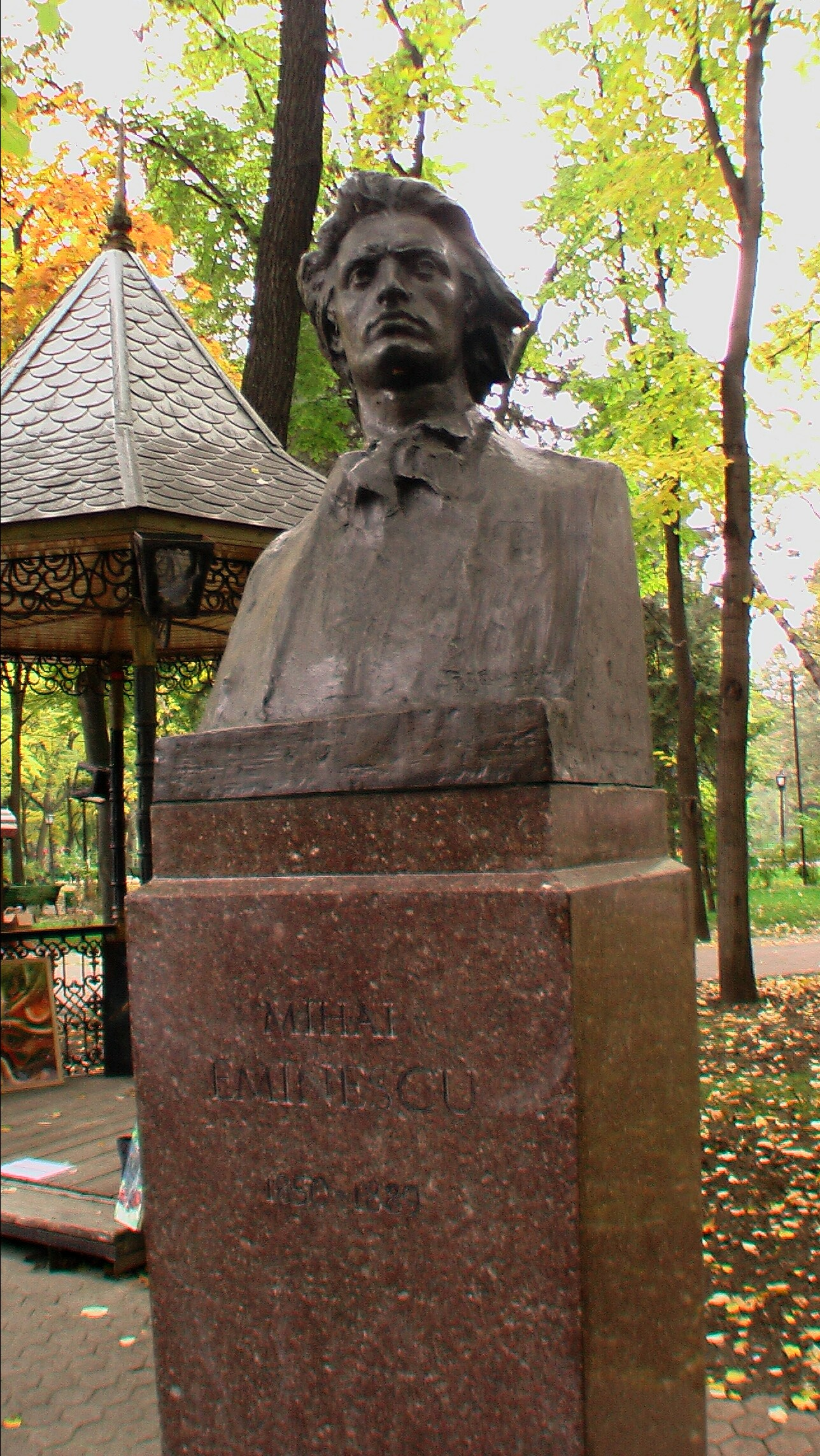 Mihai Eminescu Chisinau